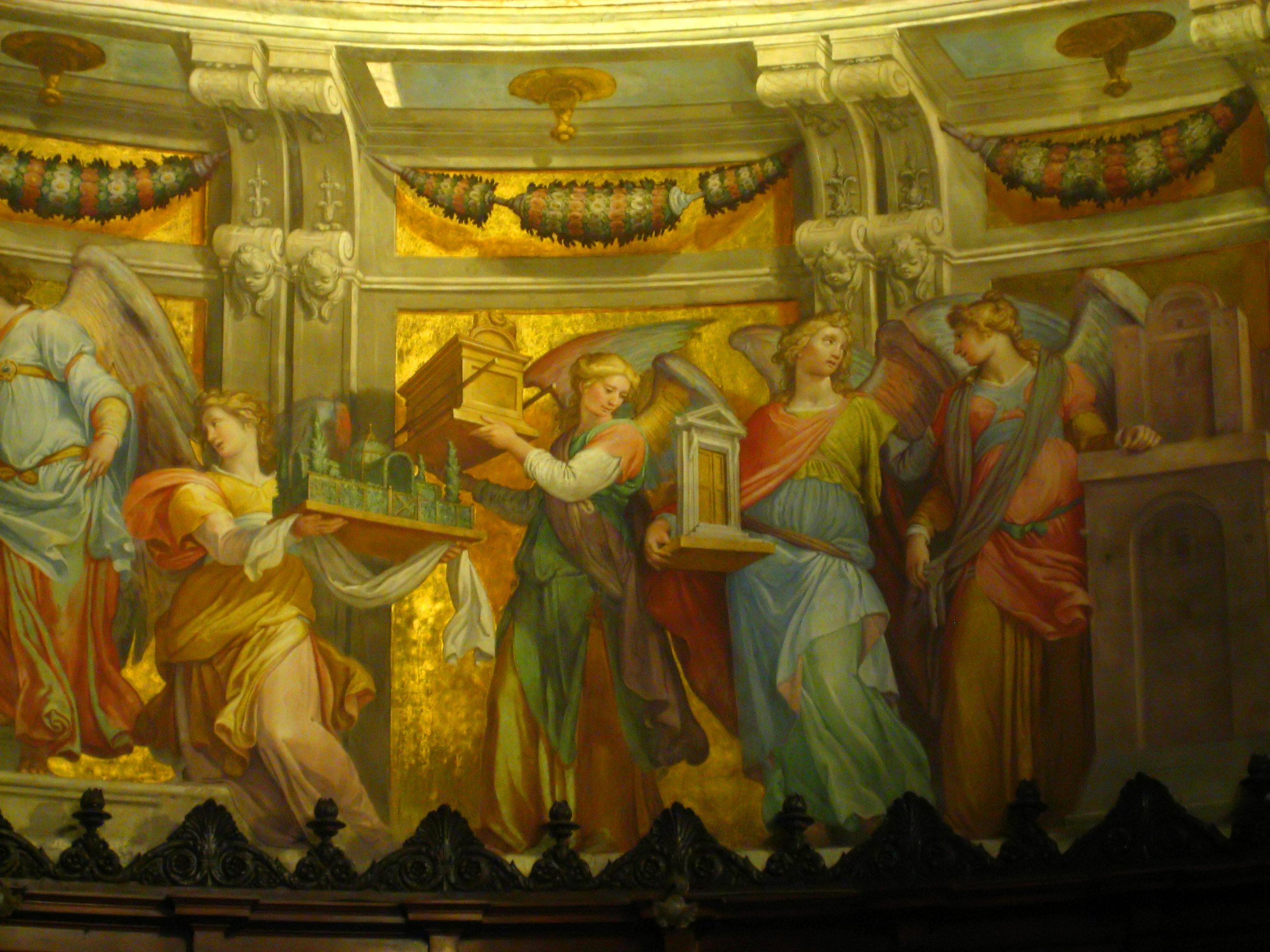 Angelic procession